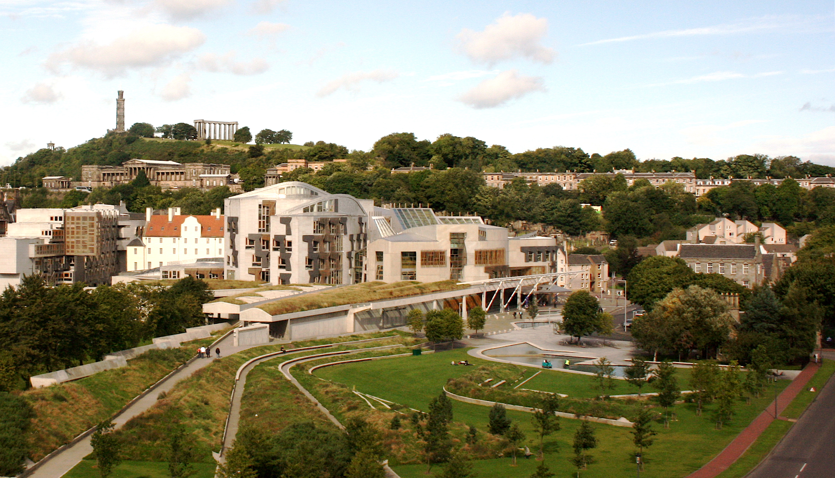 Parlamentsgebäude in Edinburgh